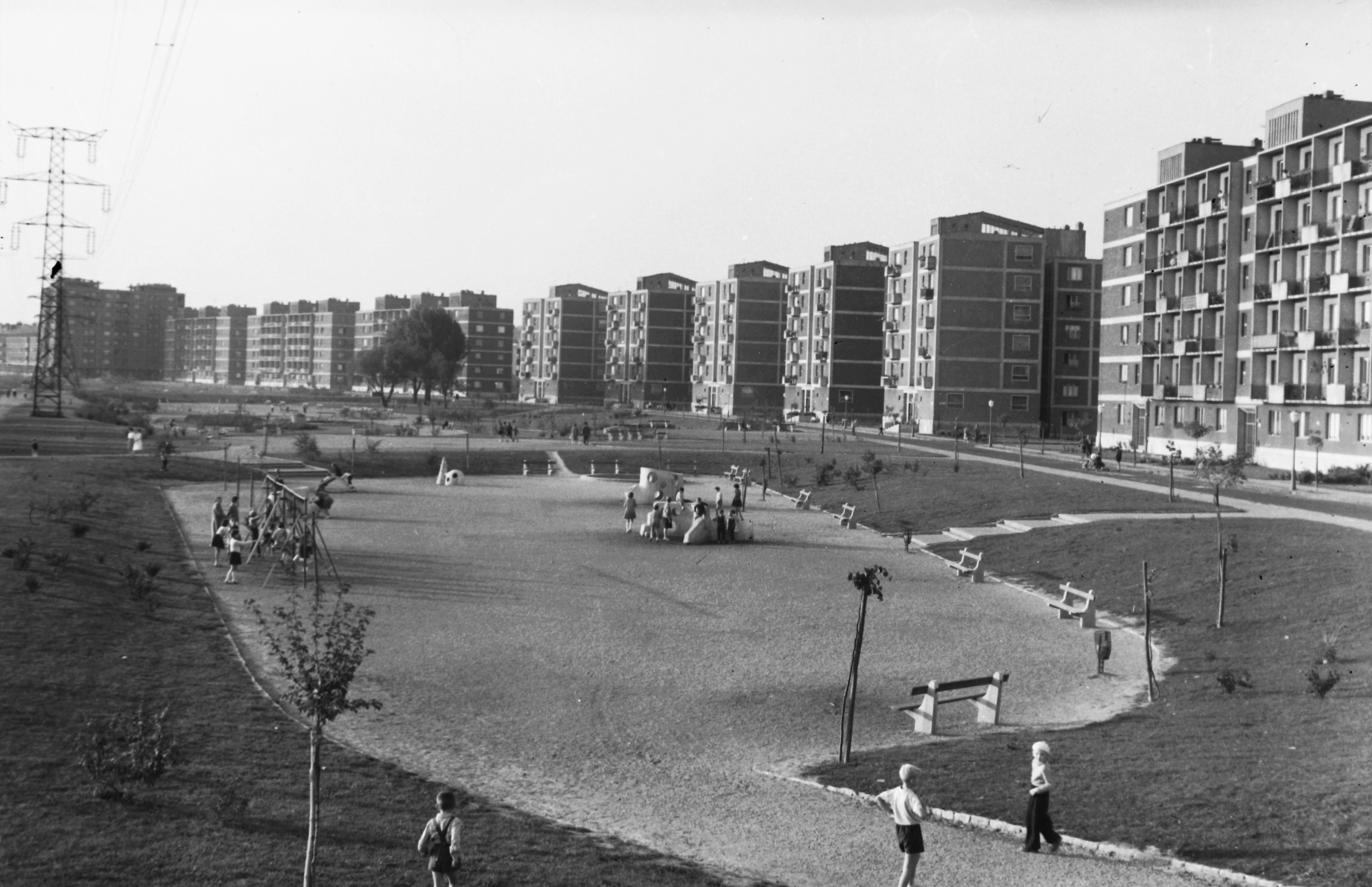 Fiastyúk (Thälmann) utcai lakótelep, Tahi utca, játszótér a Rákos-patak partjánál. Location: Hungary, Budapest XIII. Tags: playground, blocks, power line, Budapest Title: Fiastyúk (Thälmann) utcai lakótelep, Tahi utca, játszótér a Rákos-patak partjánál.